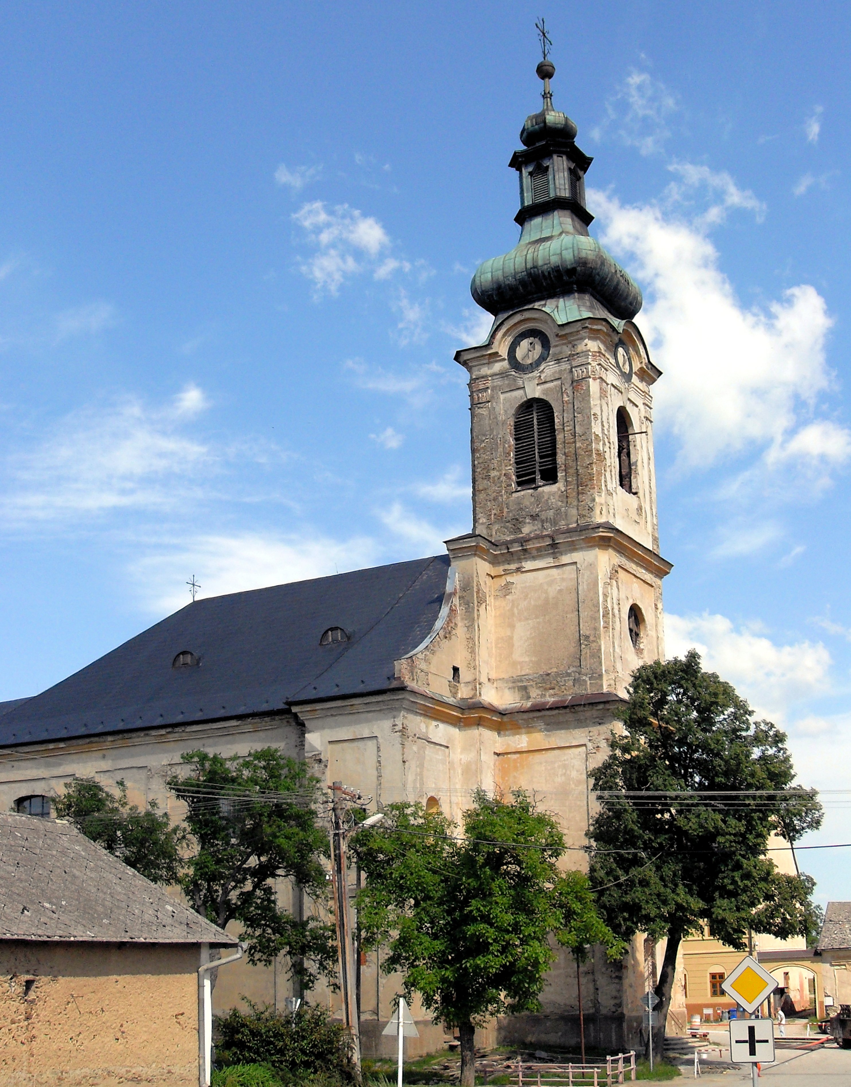 Vyšný Medzev, Rímskokatolícky Kostol svätej Márie Magdalény